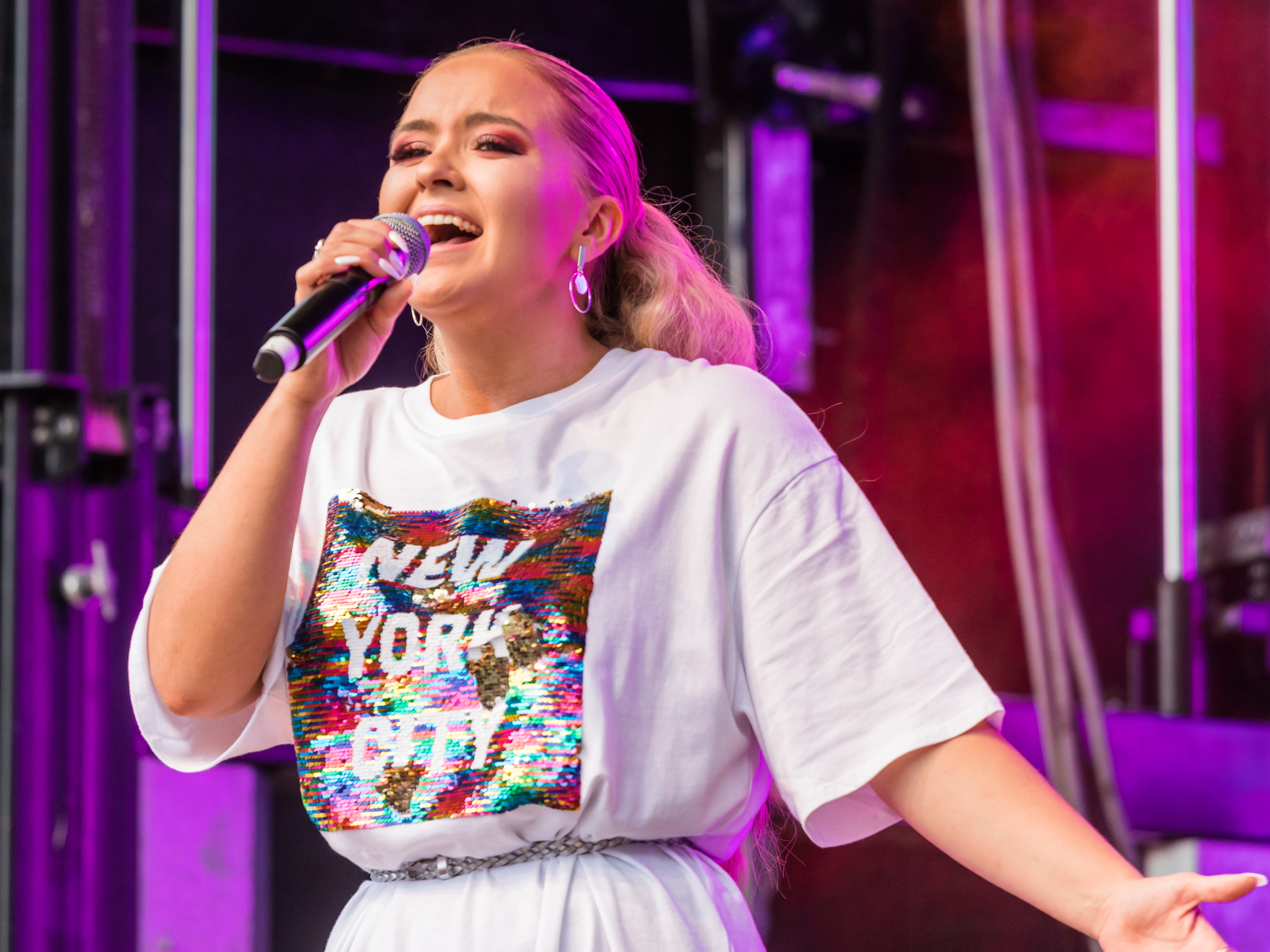 ColognePride 2019-Samstag-Hauptbühne-1850-KEiiNO